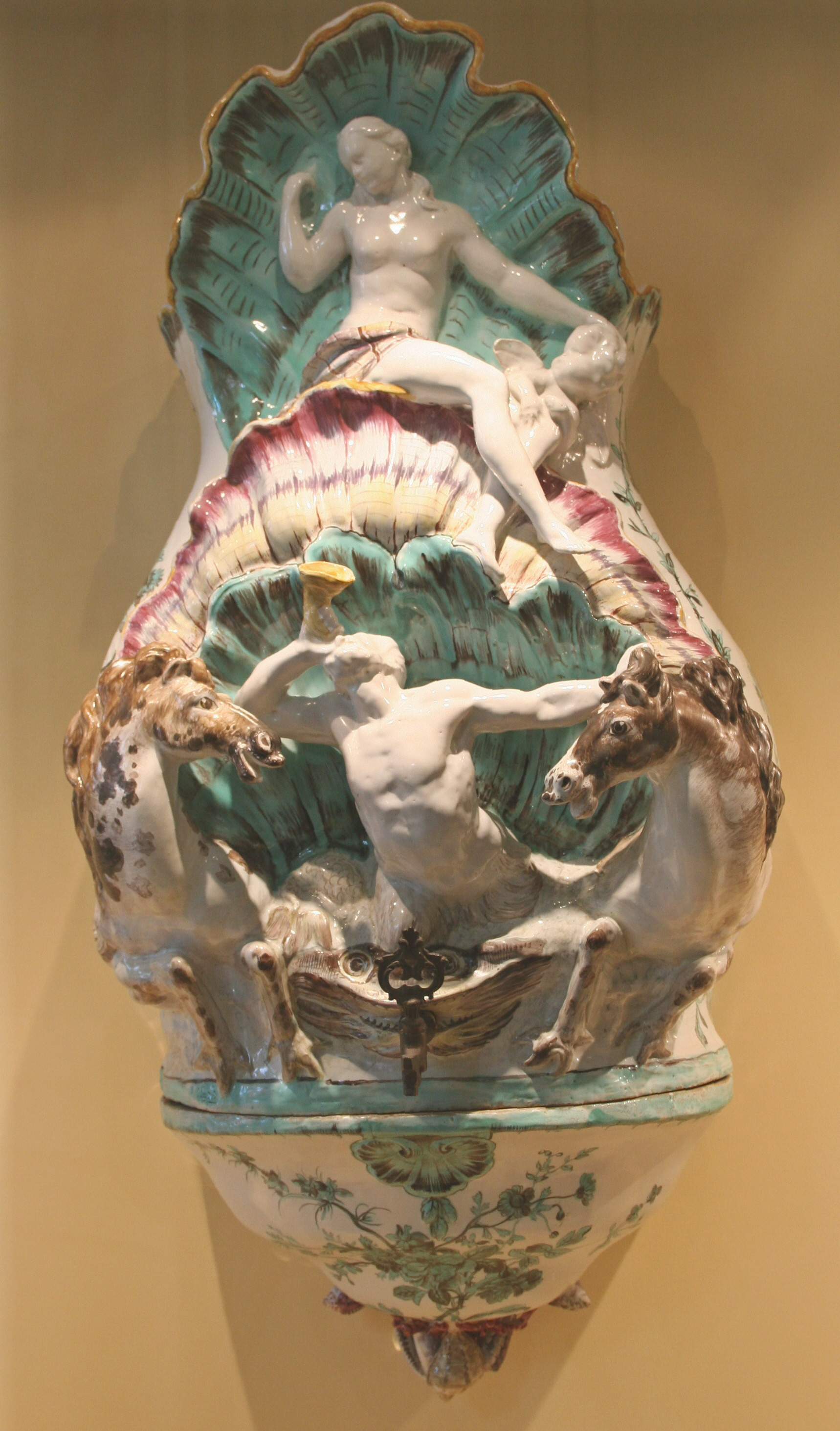 Musée de la faïence à Marseille. Fontaine d'applique avec console représentant le char d'Amphitrite. Faïence stannifère, décor petit feu polychrome pourpre, vert, jaune et manganèse des ateliers de la veuve Perrin fin du XVIIIème siècle (1765/1770). Hauteur=82cm. Largeur=37cm.